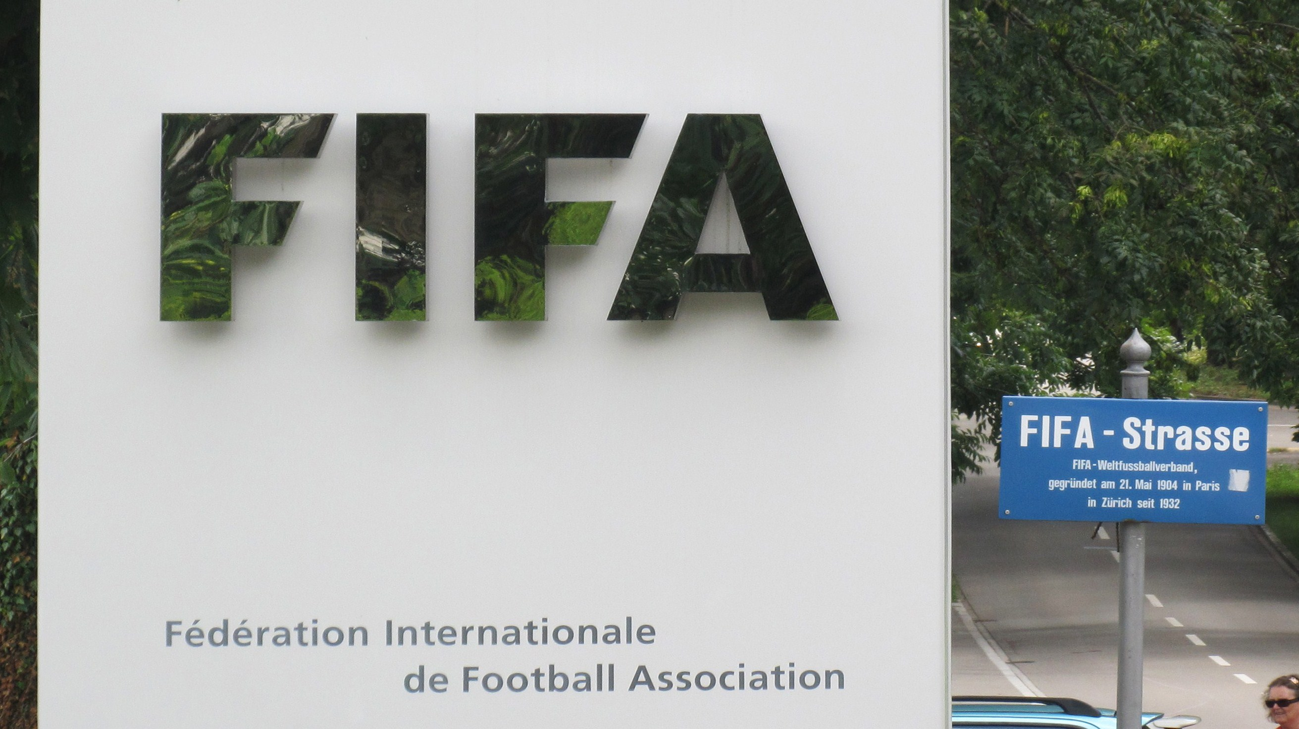 Zürich, Fédération Internationale de Football Association (FIFA) Documentation Centre, (Adolf-Jöhr-Weg 20) seit 14. Mai 2004 ist die Strasse umbenannt in Fifa-Strasse